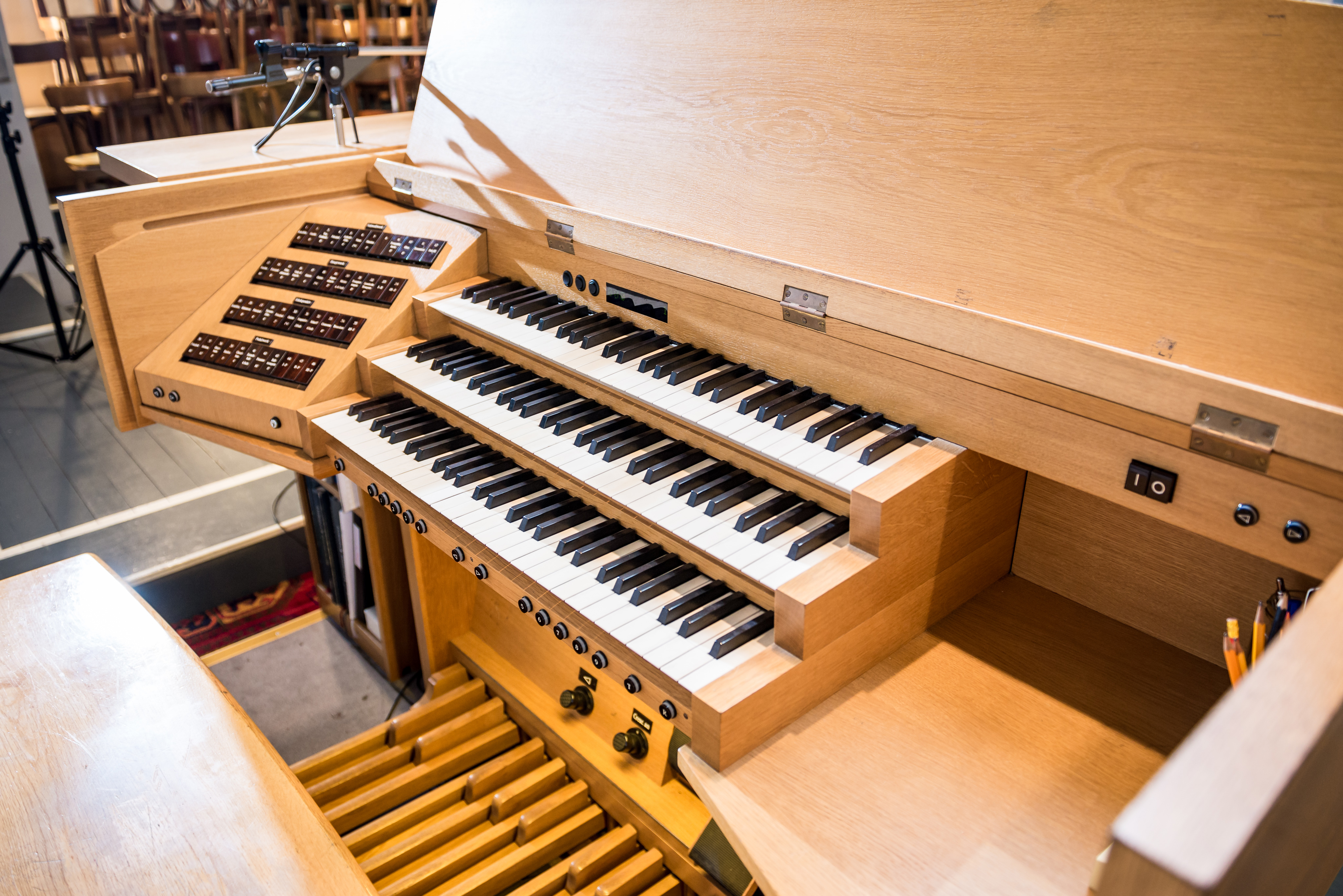 Spieltisch der Orgel von St. Laurentius Wuppertal